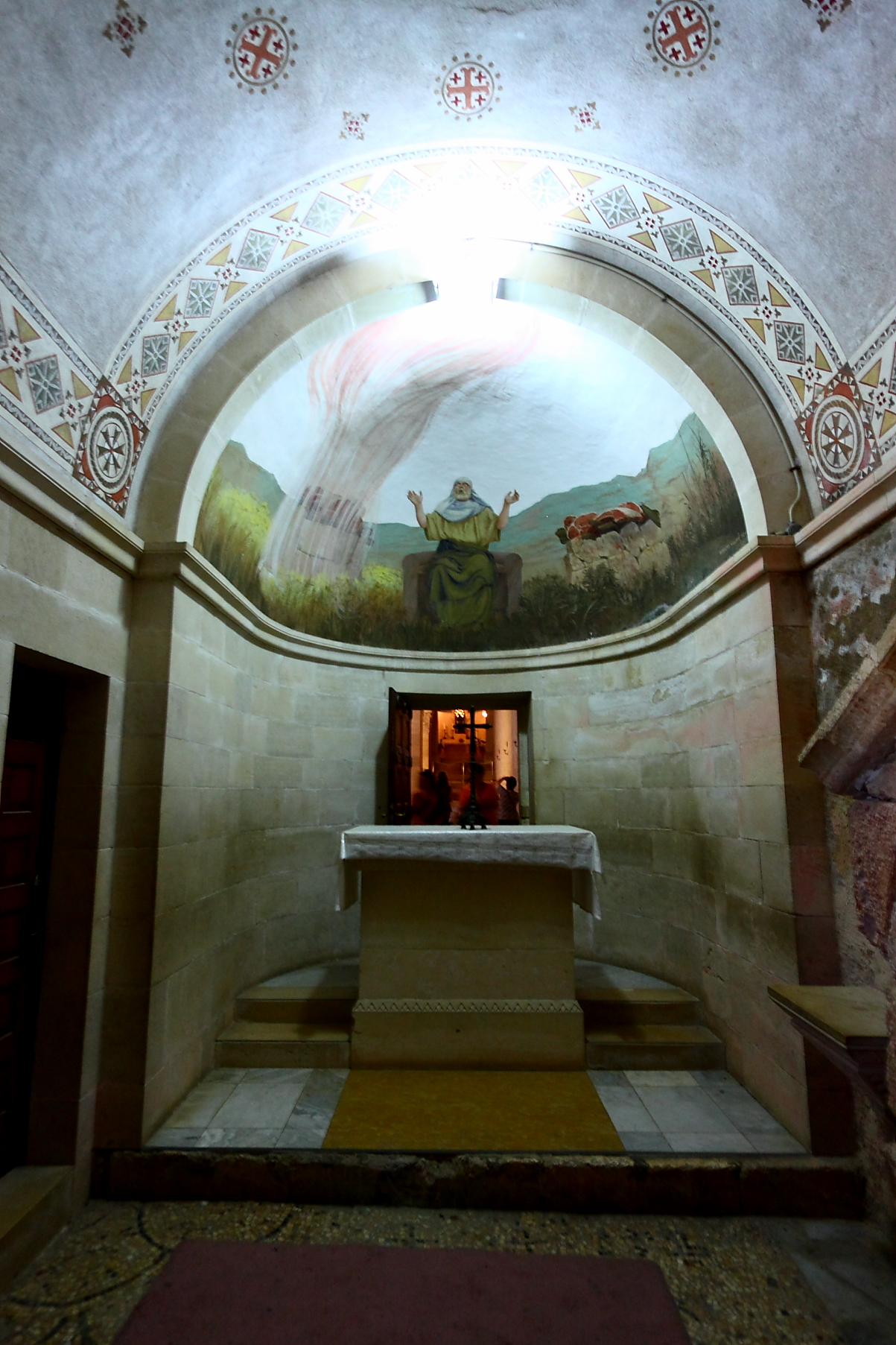 Придел в честь пророка Илии в католическом храме Преображения на горе Фавор в Израиле.